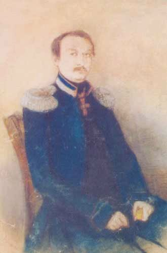 Давид Дадиани